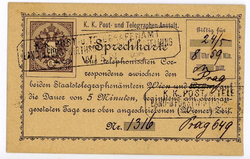 Ein Florin Telefonkarte, 1885 Ausgabe, zur telephonischen Correspondenz zwischen den beiden Staatstelegraphenämtern Wien und Prag (statt Brünn ) auf die Dauer 5 Minuten. Kasten Absempelungen K.K.POST-U TELEGRAPHENAMT LAND U. FORSTWIRTHSCHAFT AUSTELLUNG WIEN.